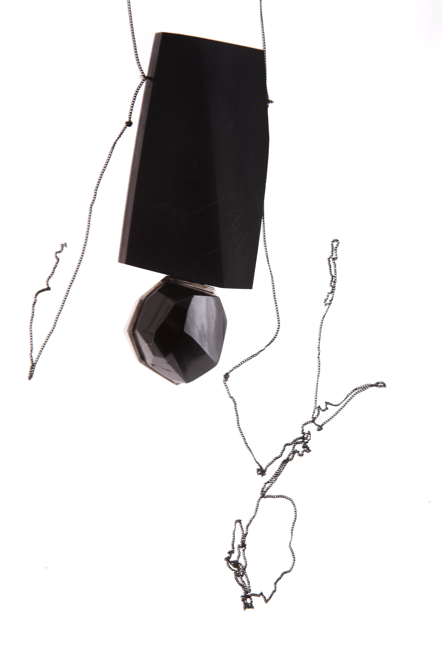 Kaelaehe "Amnesia" (2010). Kõrgus 120 mm. Materjalideks eebenipuu, must turmaliin ja hõbe. Kuulub Demmelhuberi kollektsiooni Saksamaal. Autor: Kadri Mälk.